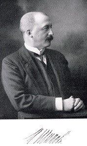 Иван Шипов - управляющий Государственного банка в 1914-1917